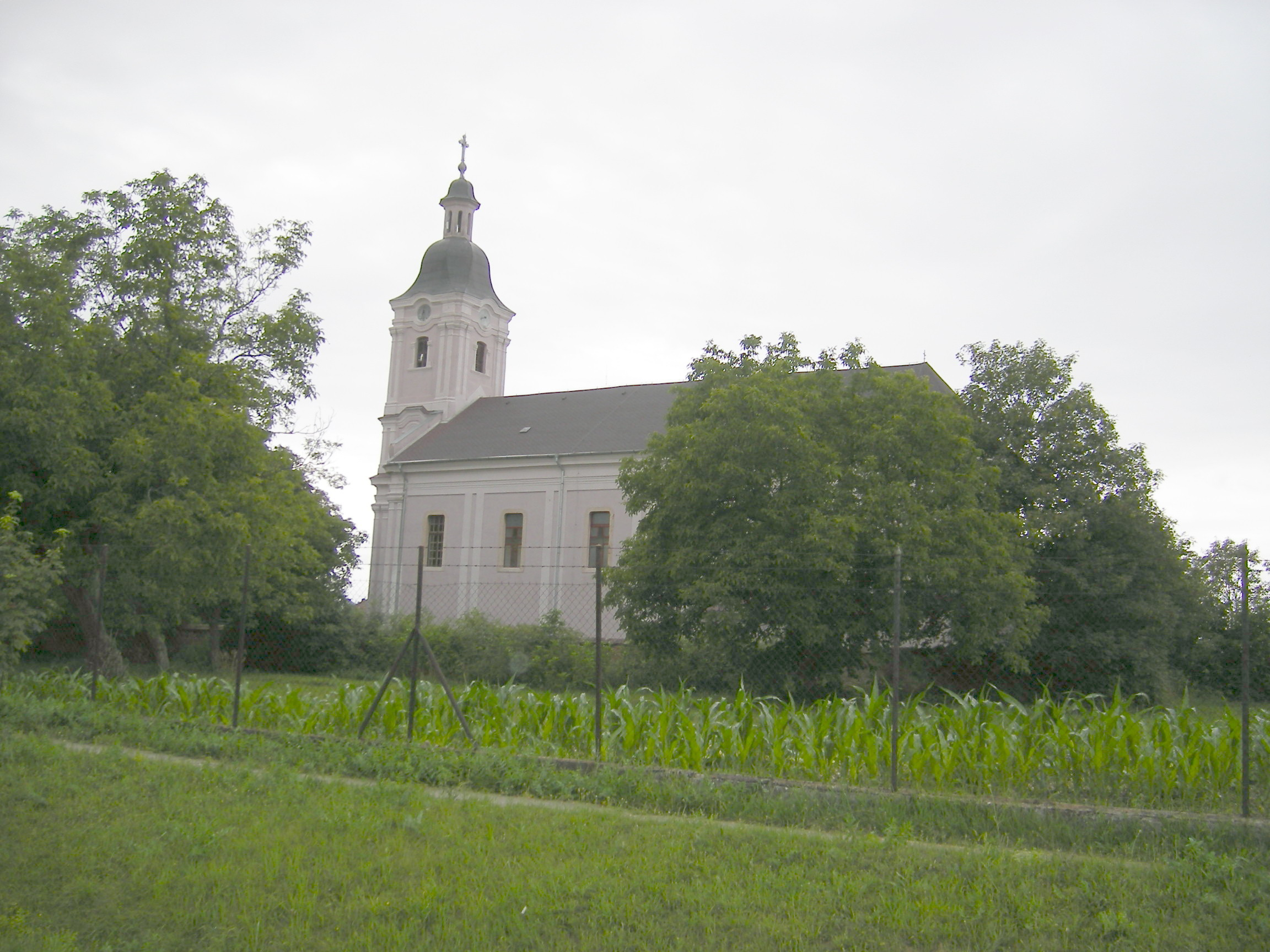 Tekovské Lužany (LV), catholic church